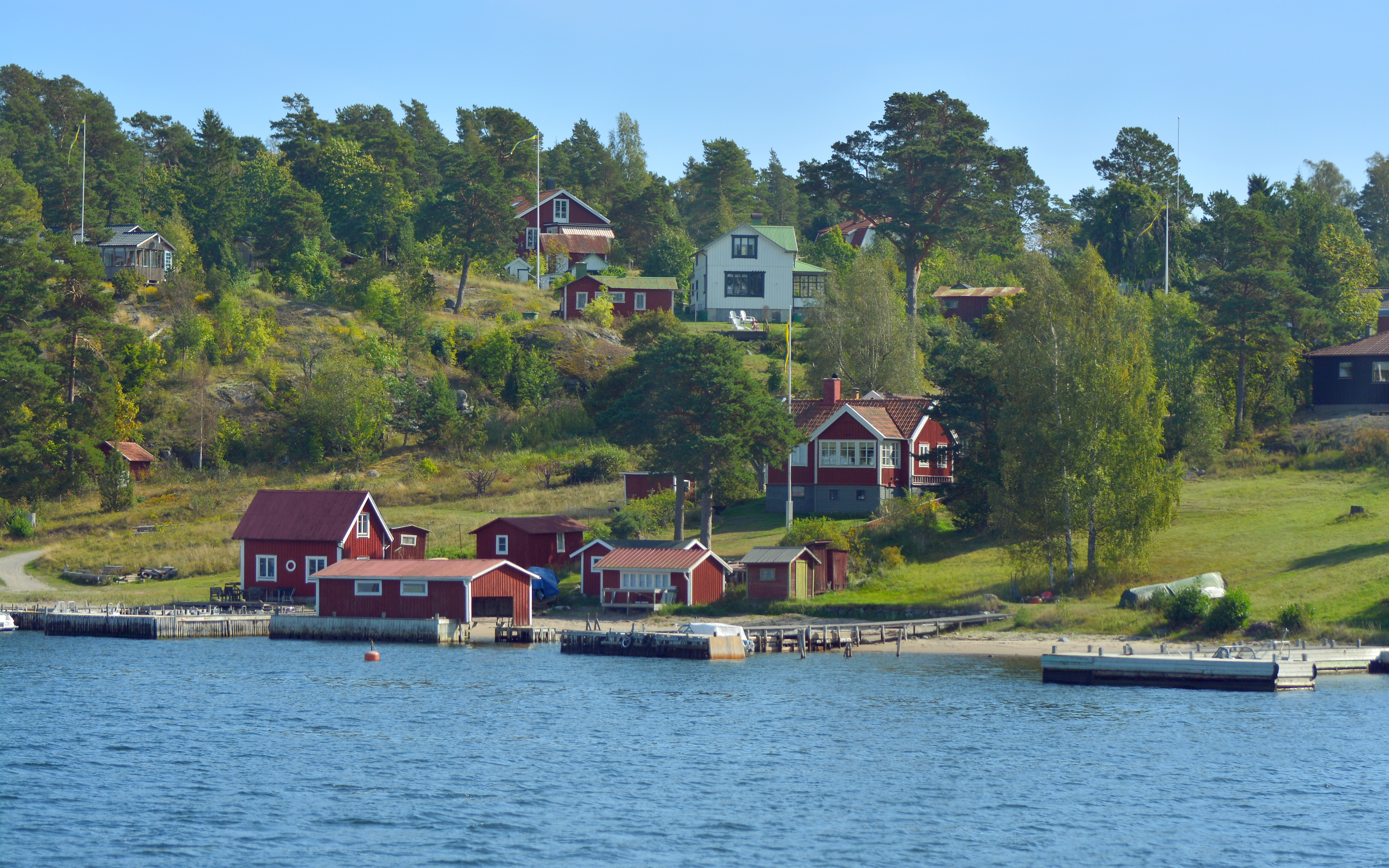 Byn Gatan på norra Runmarö i Stockholms skärgård.